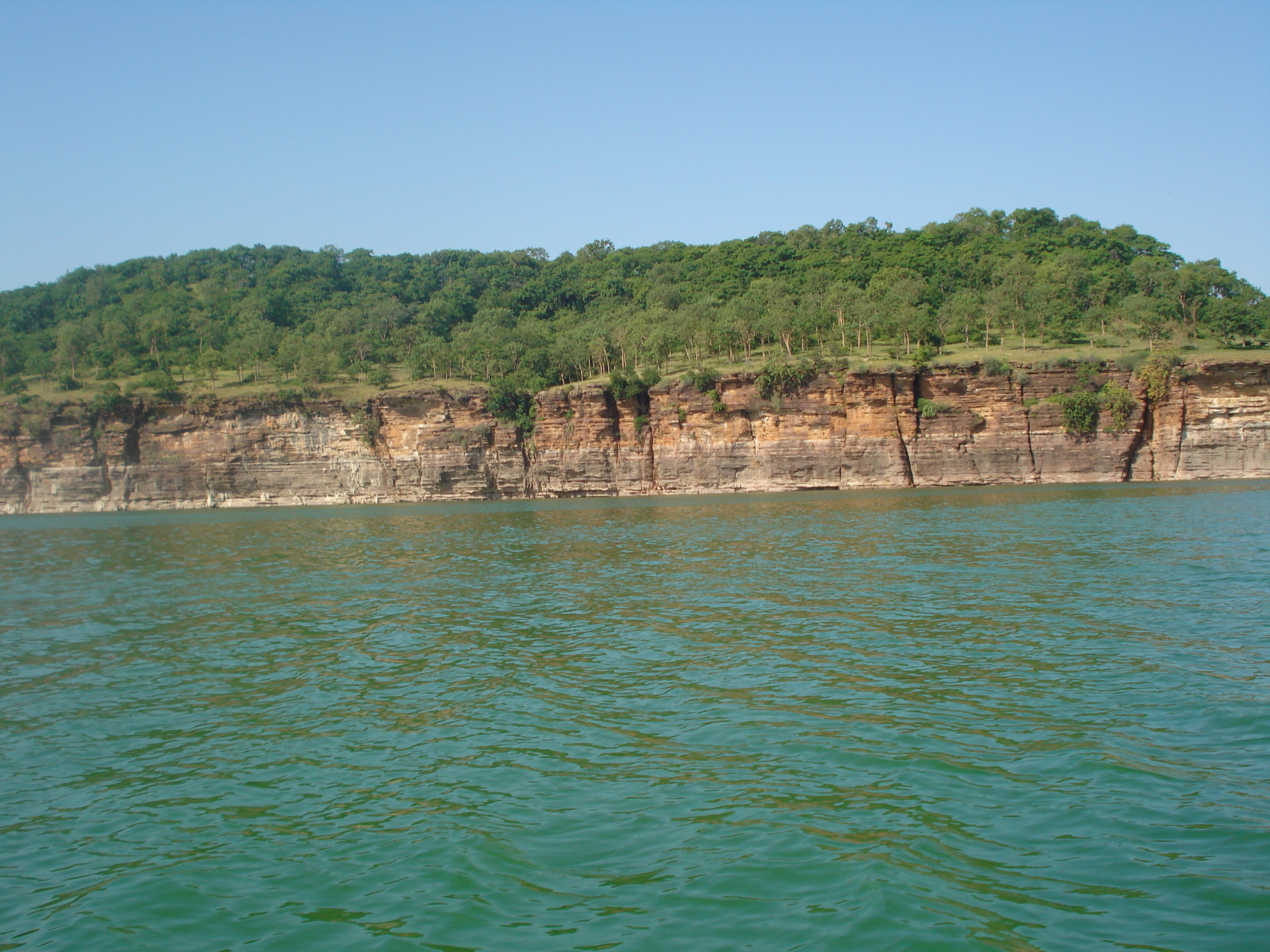 Gandhi_Sagar_Mandsaur